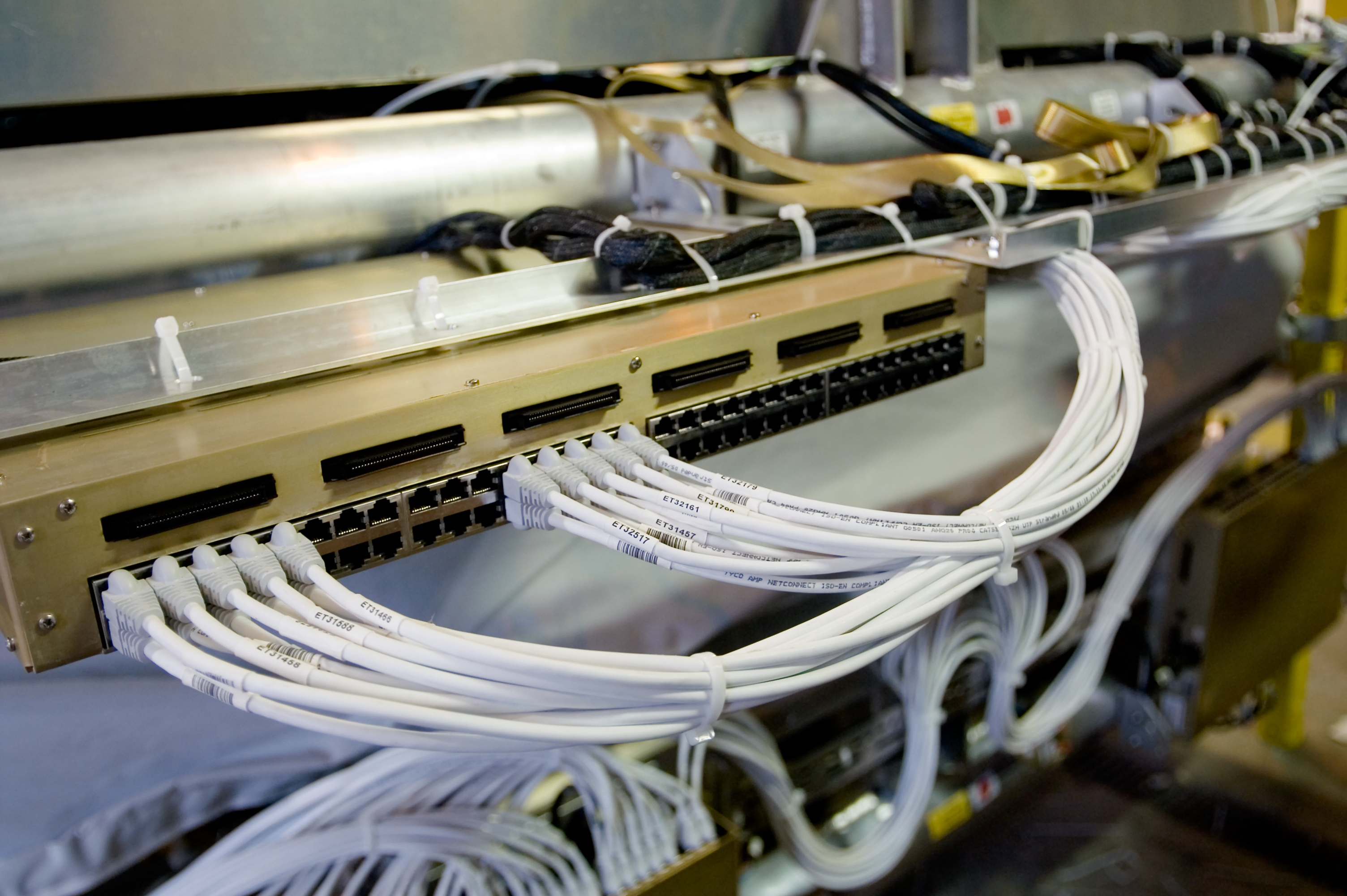 Câbles RJ-45